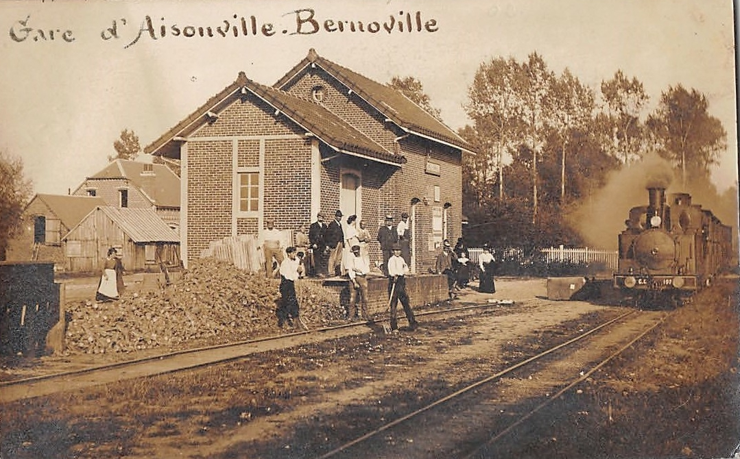 La gare d'Aisonville-Bernoville vers 1910.